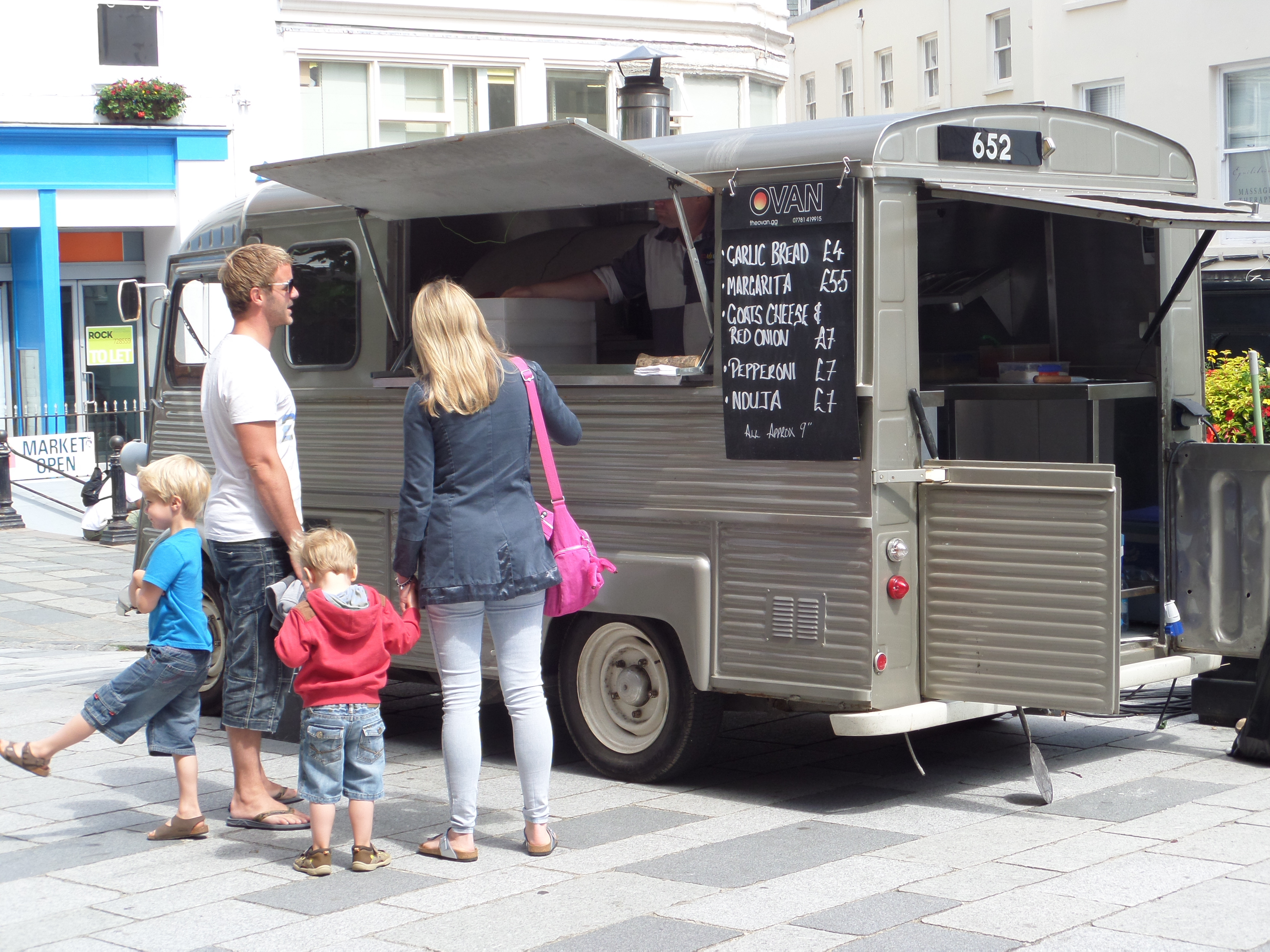 Citroen H Pizza Van at St Peter Port Guernsey